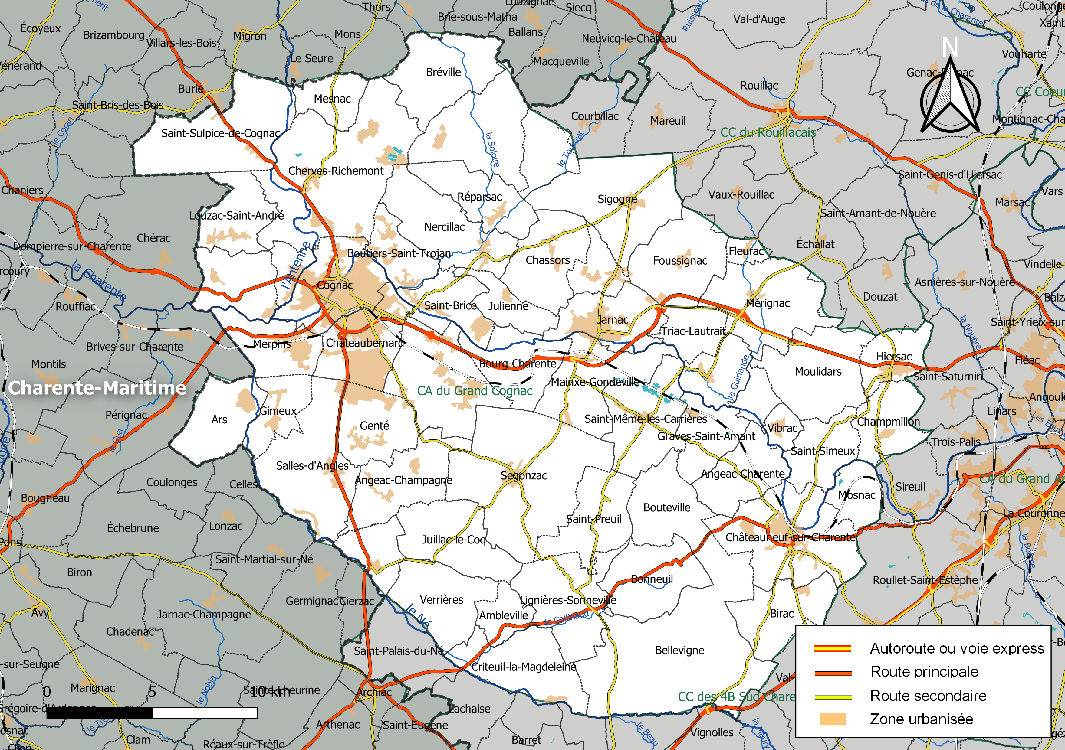 Carte géographique de la Communauté d'agglomération du Grand Cognac, département de la Charente, France. Composition au 1er janvier 2019.